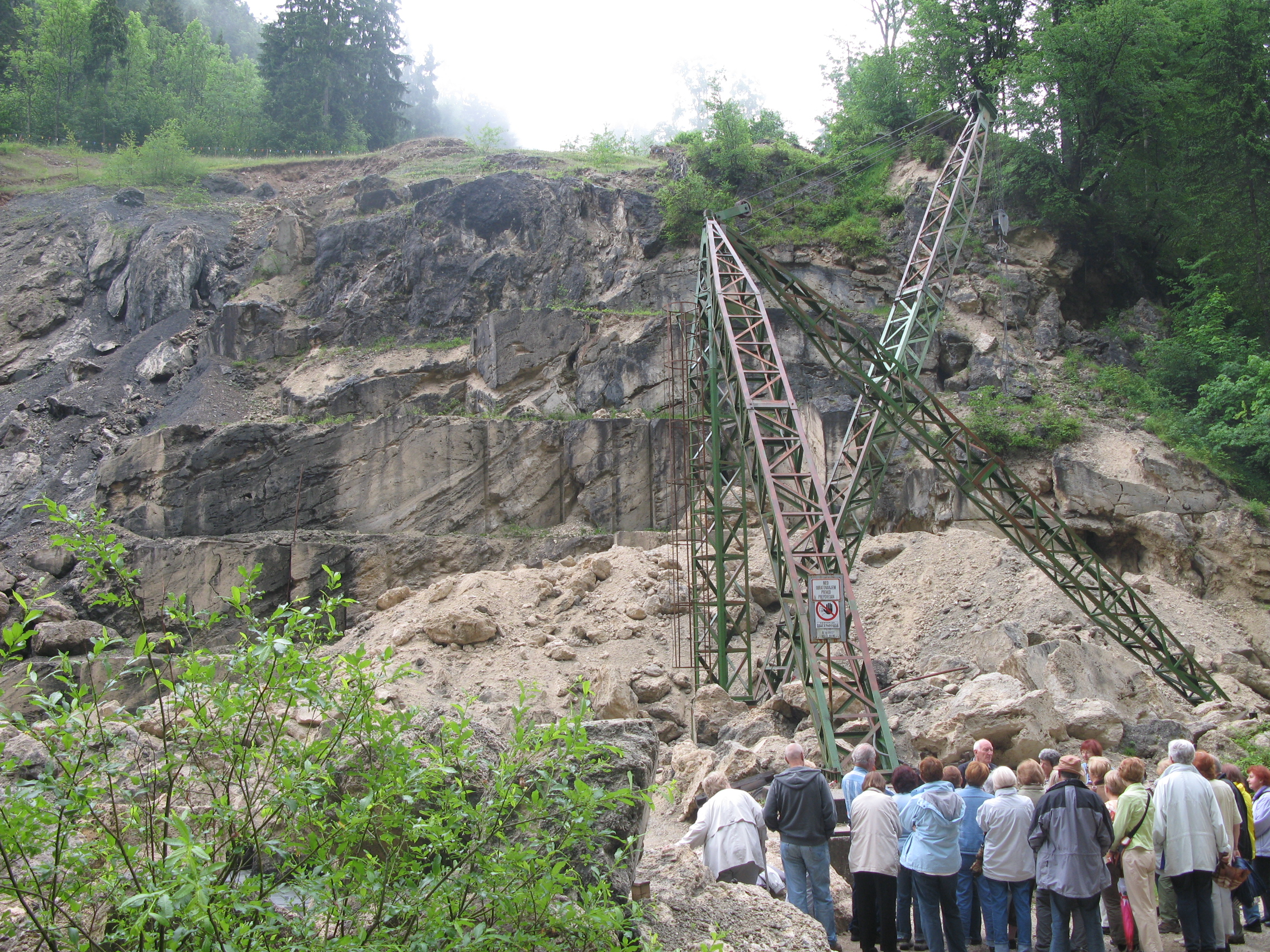 Kamnolom lehnjaka na Jezerskem